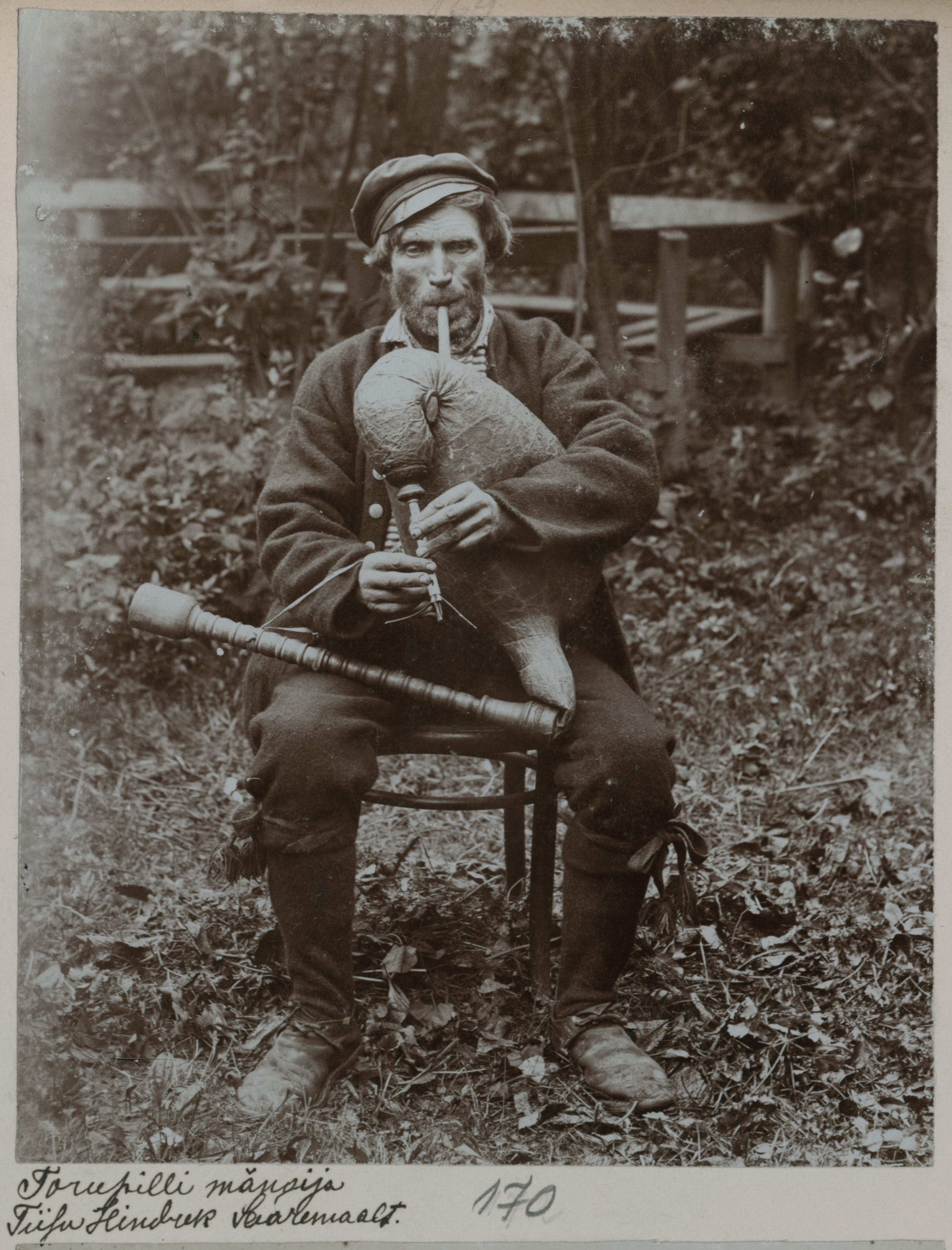 Torupillimängija Tiisu Hindrik Saaremaalt